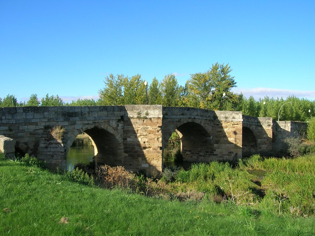 Puente sobre el río Cea en Sahagún (provincia de León).